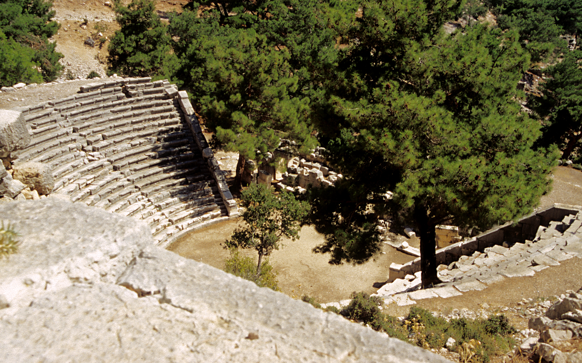 Arykanda, Südtürkei, Theater